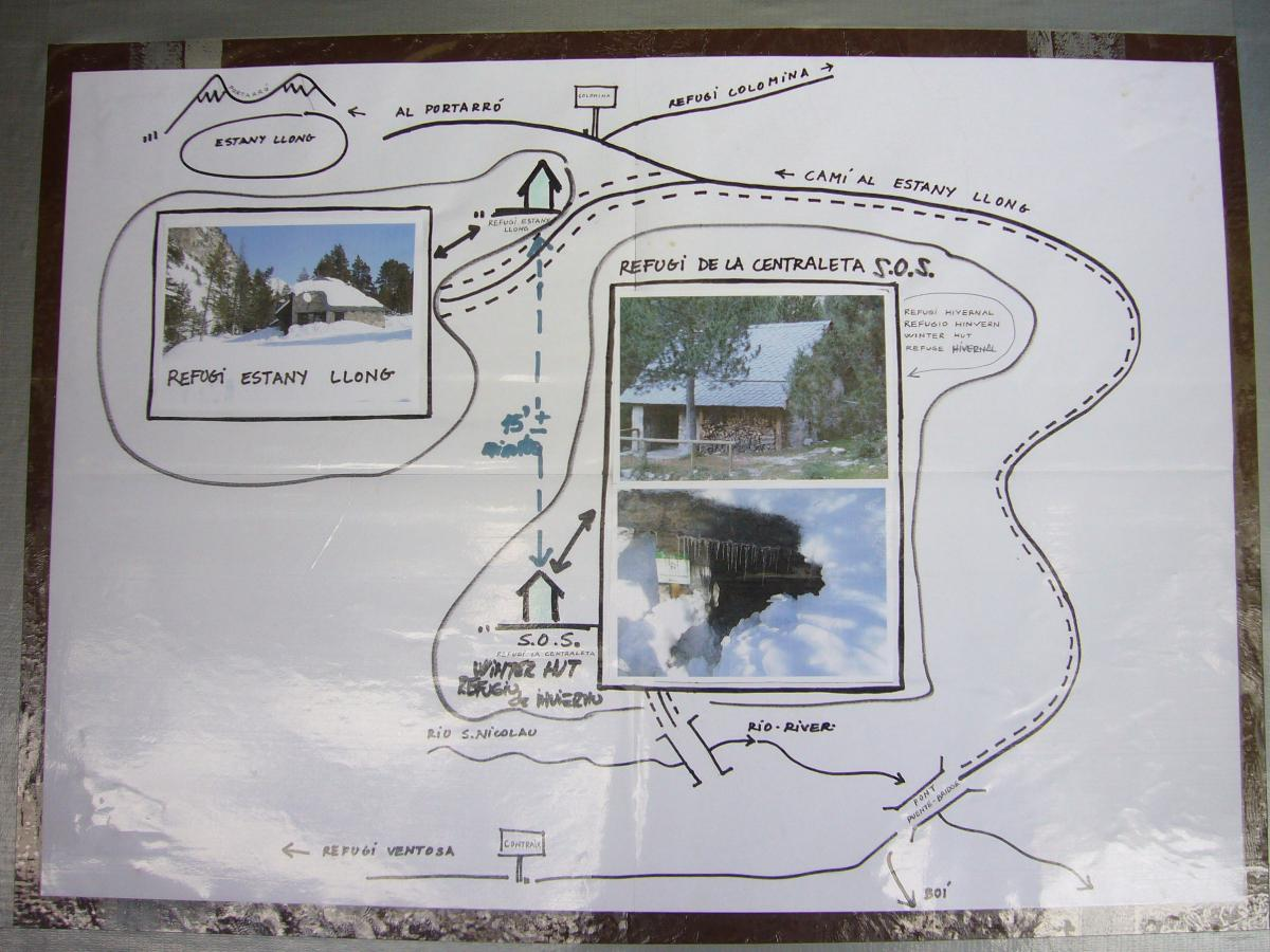 Indicador al Refudi d'Estany Llong; la Vall de Boí, Alta Ribagorça, Catalunya